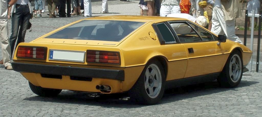 Lotus Esprit